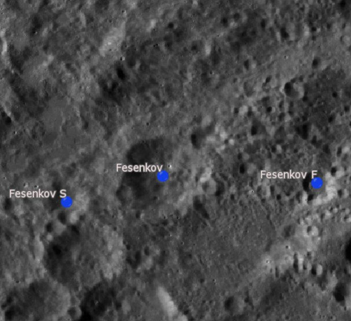 Cráter lunar Fesenkov. Cráteres satélite. (Imagen LRO)